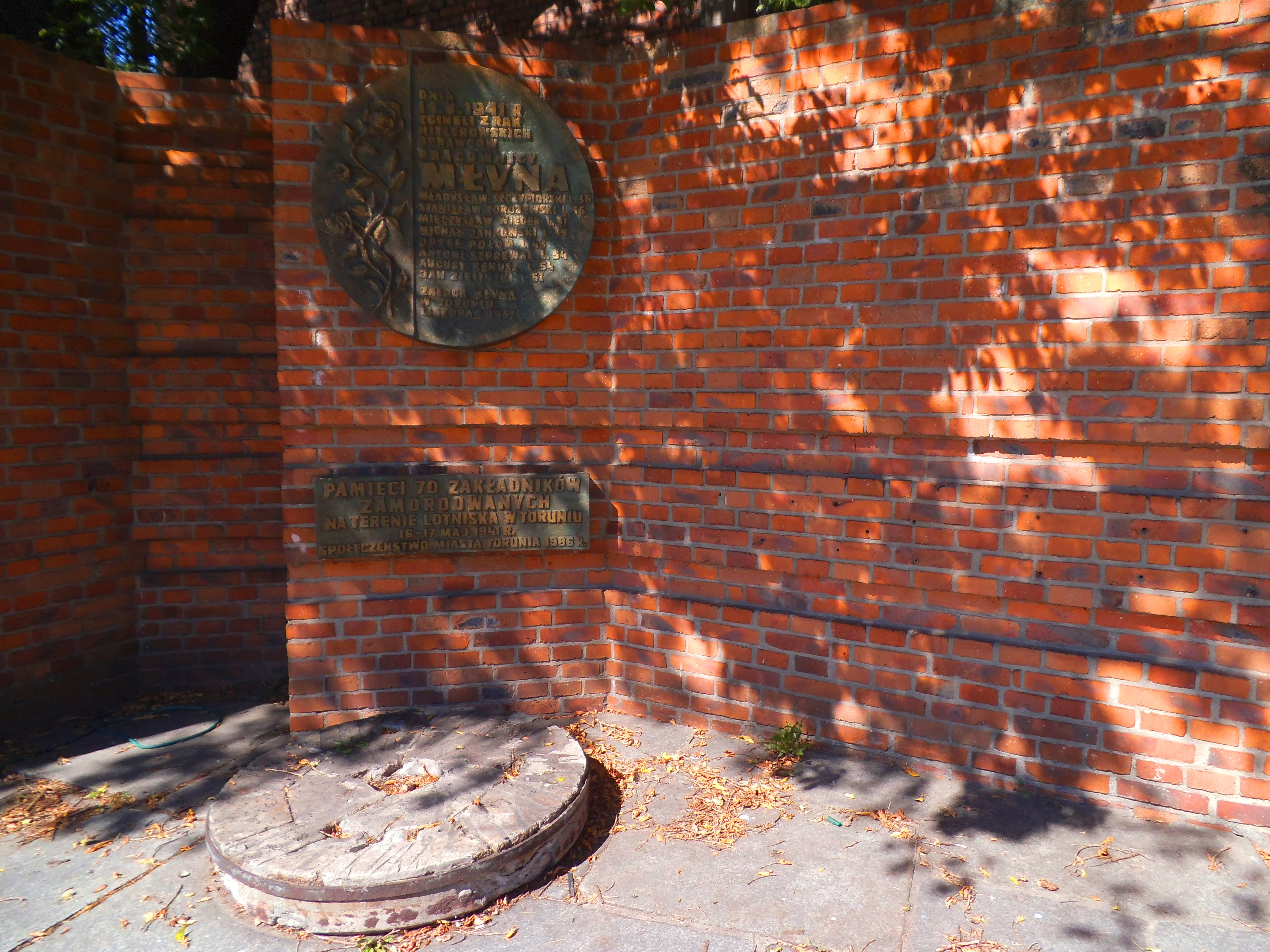 Młyny Richtera w Toruniu, pomnik młynarzy